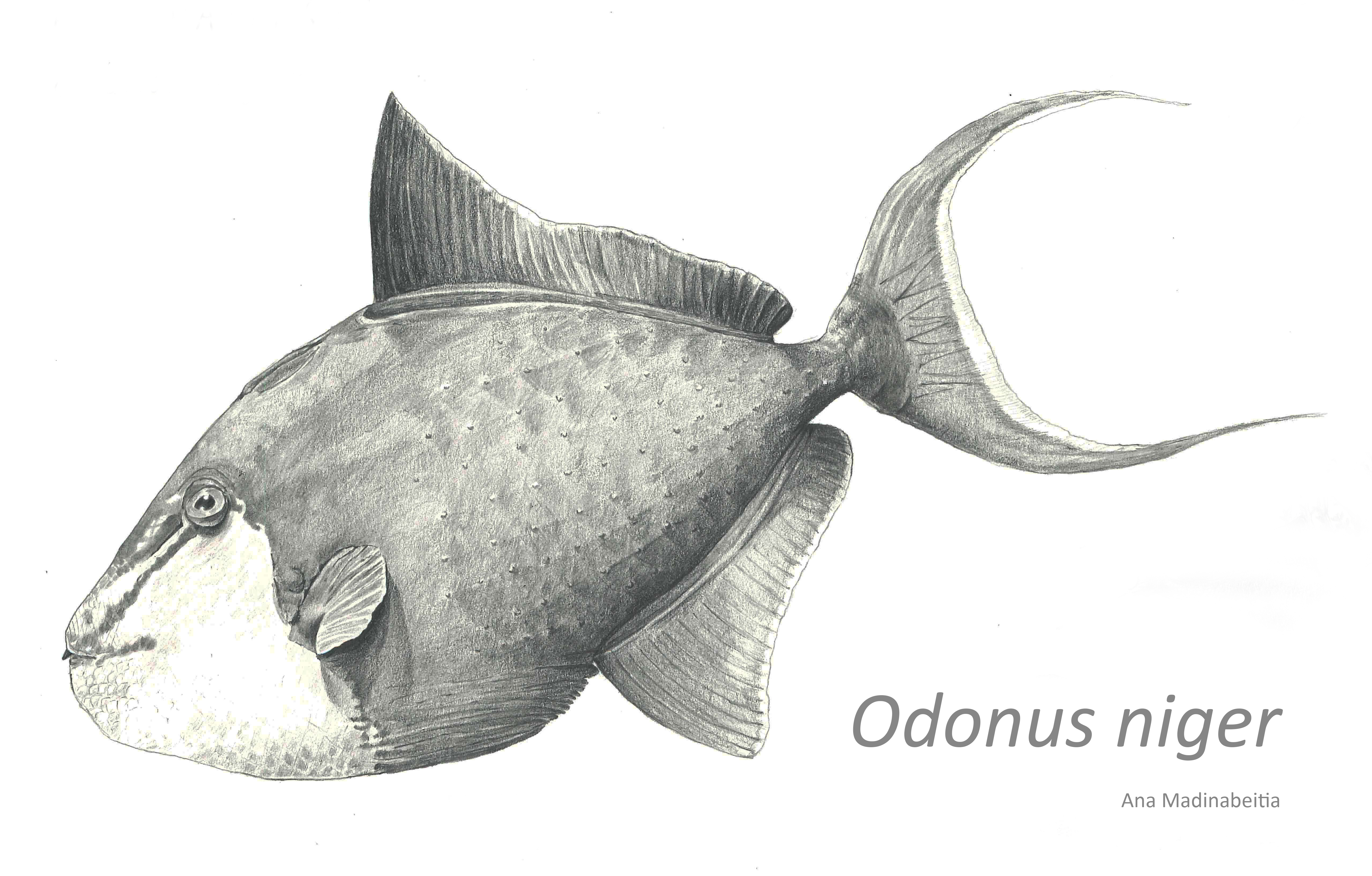 Odonus niger Balistidae familiako arrain bat da